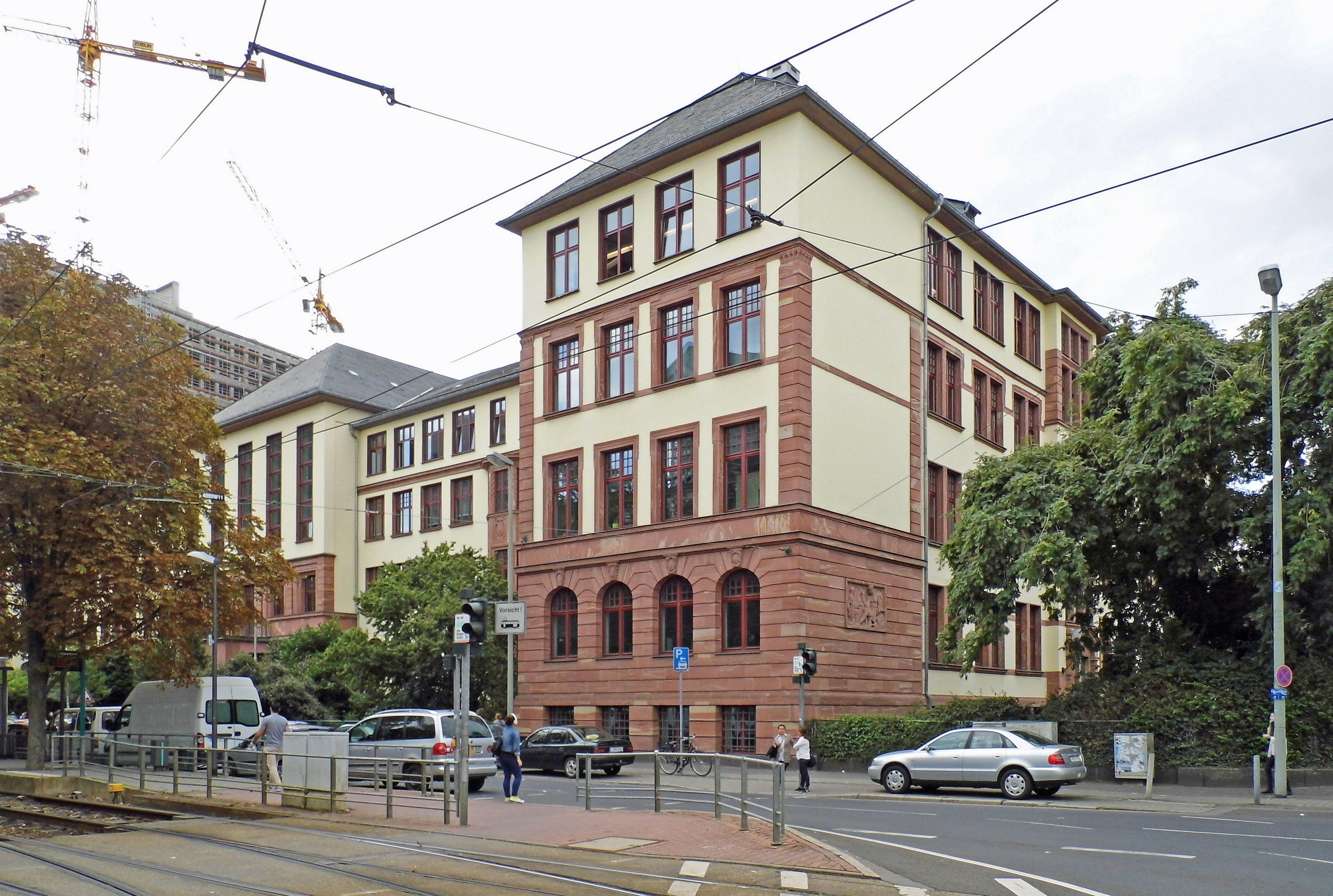 Schulgebäude seit 1911, Hamburger Allee 23, Frankfurt am Main. "Gutenbergschule" (linke Seite): Berufs-, Berufsfach-, Fach- und Fachoberschule (Grafik und Medien), sowie "Frankfurter Schule für Bekleidung und Mode" (rechte Seite - war bis 1991 "Werner-von-Siemens-Schule"): ebenfalls verschiedene Zweige von Berufs- bis Fachoberschule.